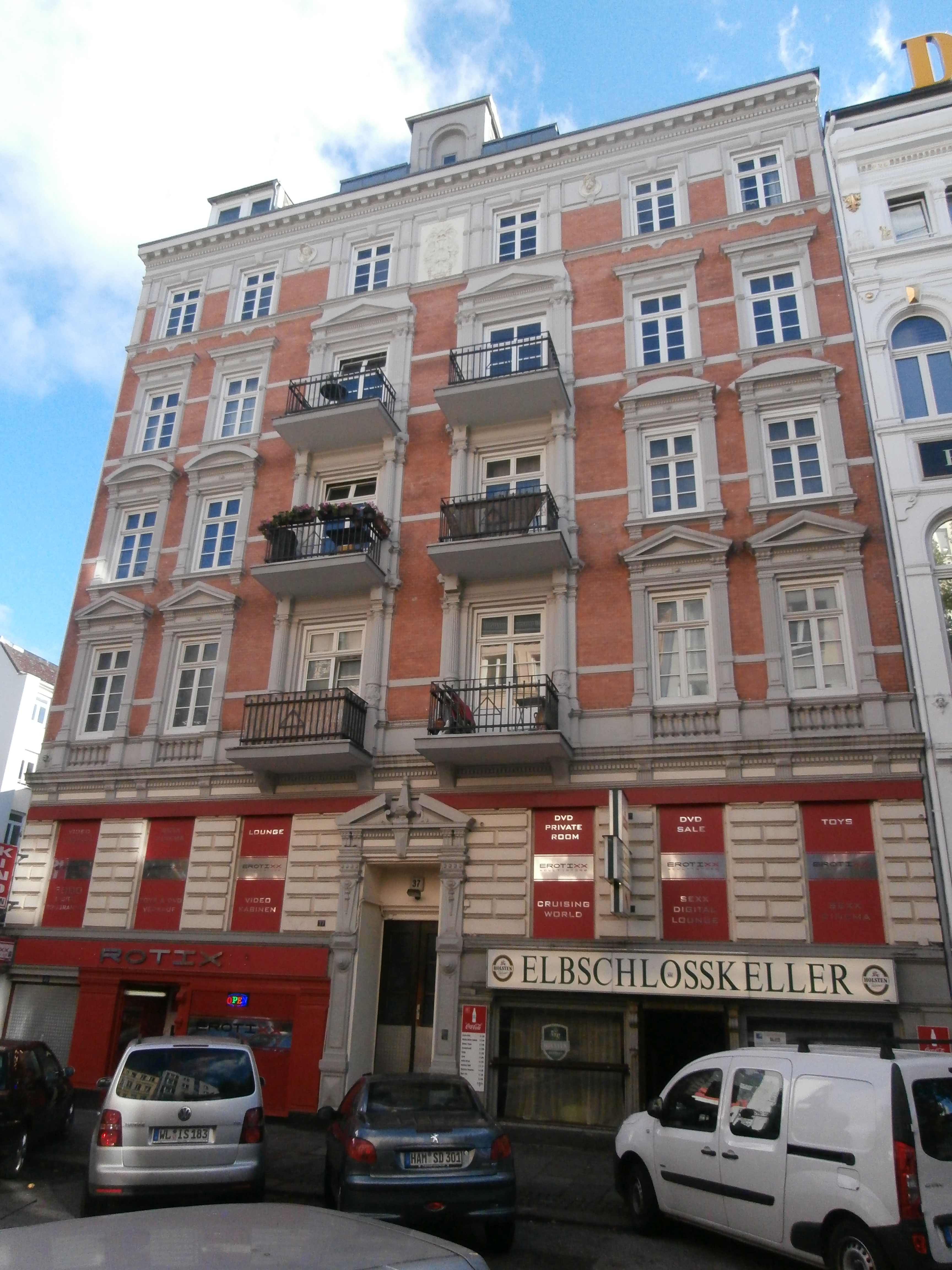 Wohngeschäftshaus von 1888This is a photograph of an architectural monument.